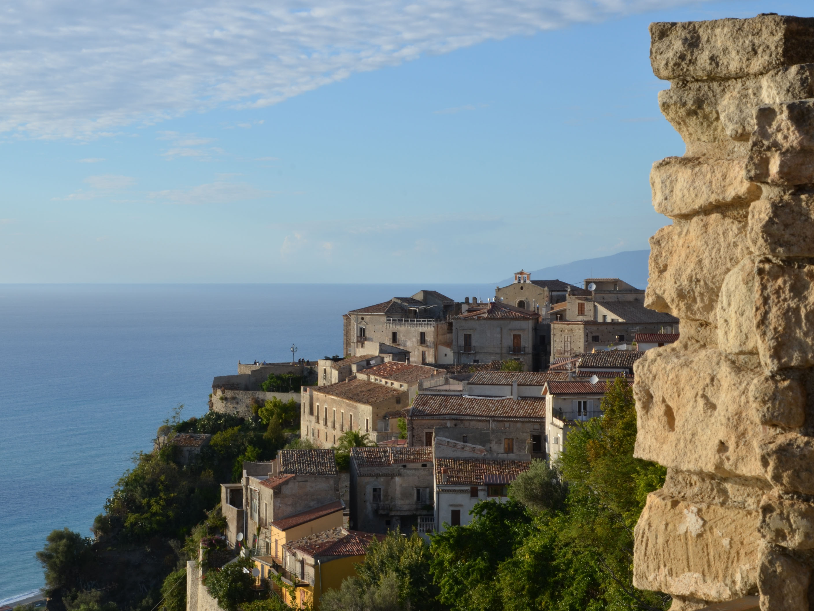 Castello della Valle This is a photo of a monument which is part of cultural heritage of Italy.